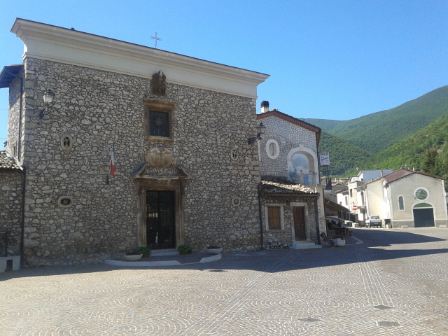 Collelongo: chiesa Madonna del Rosario